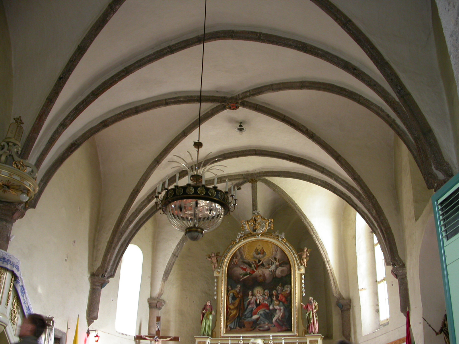 Ansamblul bisericii romano-catolice "Sf. Maria Mică" sec. XIV - XVIII